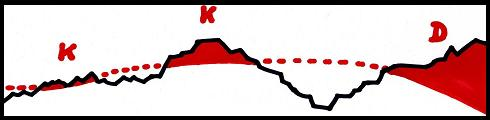 Klippe (tektonische Struktur)